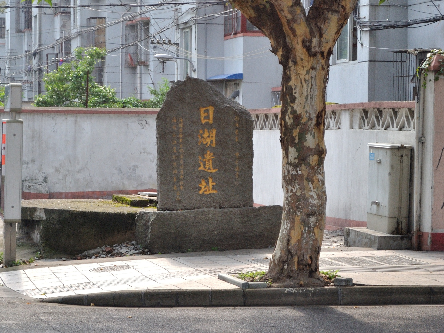 宁波日湖遗址